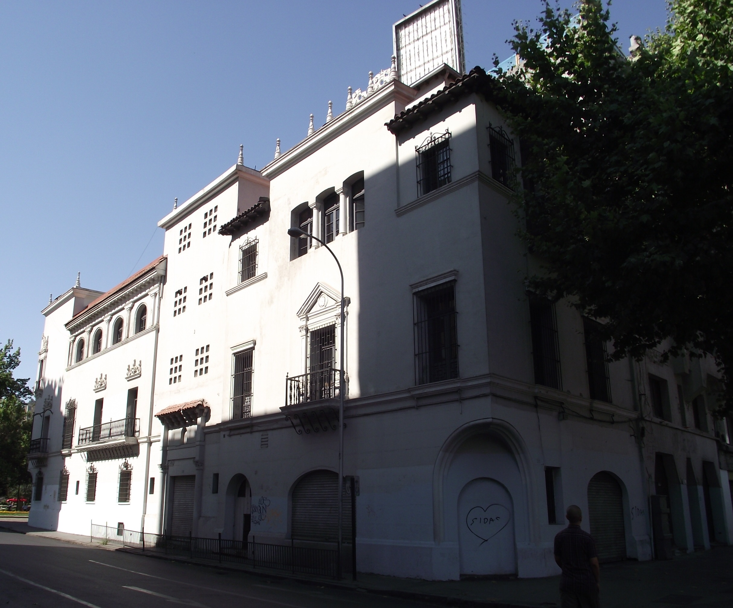 Antigua casona utilizada como sede por el Frente Nacionalista Patria y Libertad hasta 1973, ubicada en la intersección de la calle Irene Morales con la Alameda Libertador Bernardo O'Higgins, en Santiago de Chile.